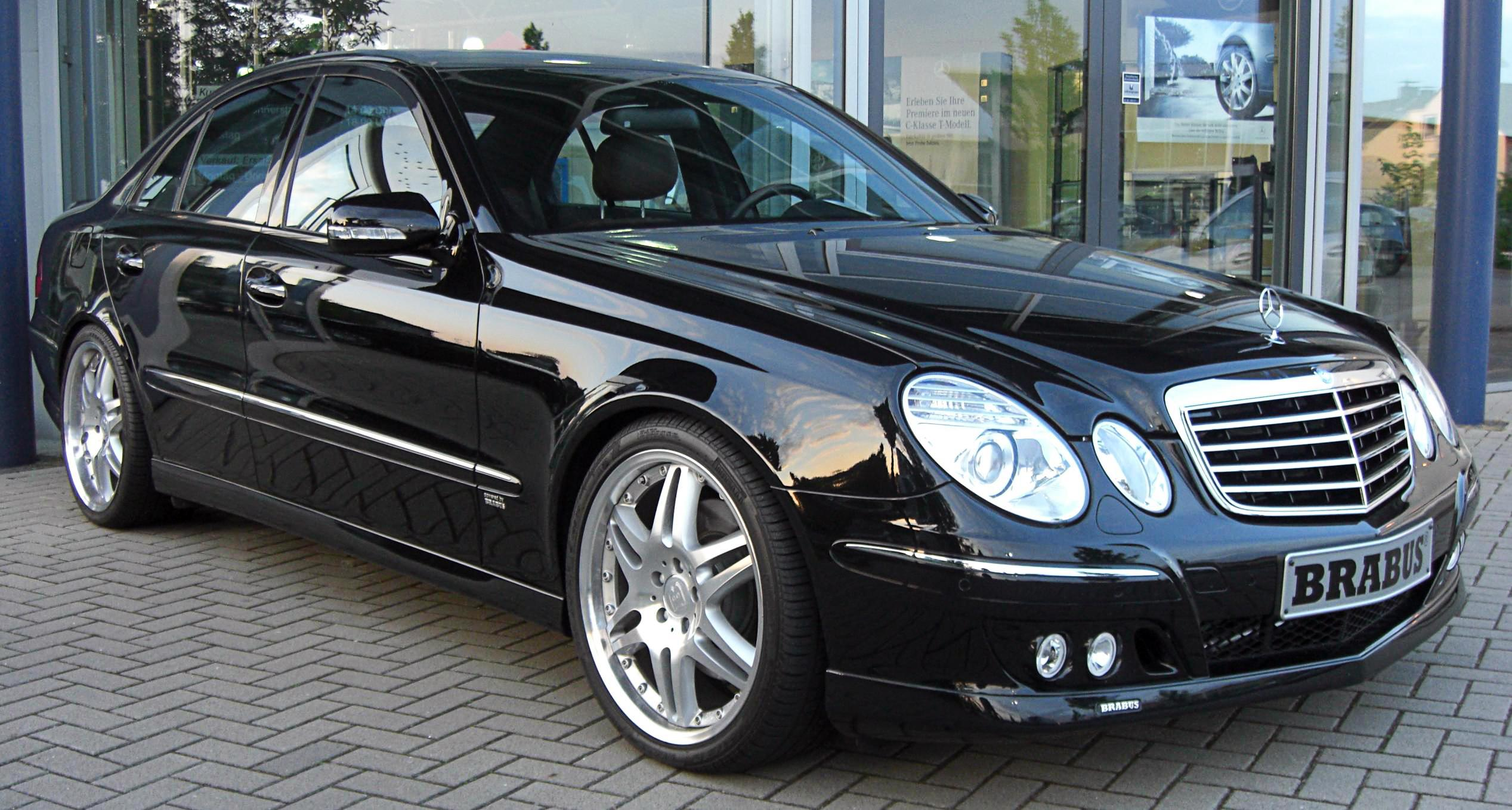 Mercedes E-Klasse Facelift mit Brabus-Kit